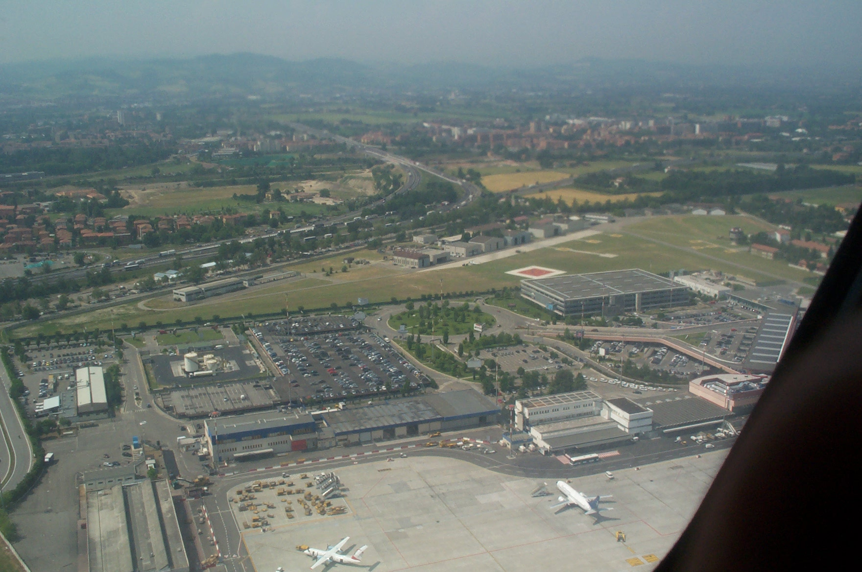 Veduta aerea dell'aeroporto di Bologna (2) Categoria:Immagini di Bologna